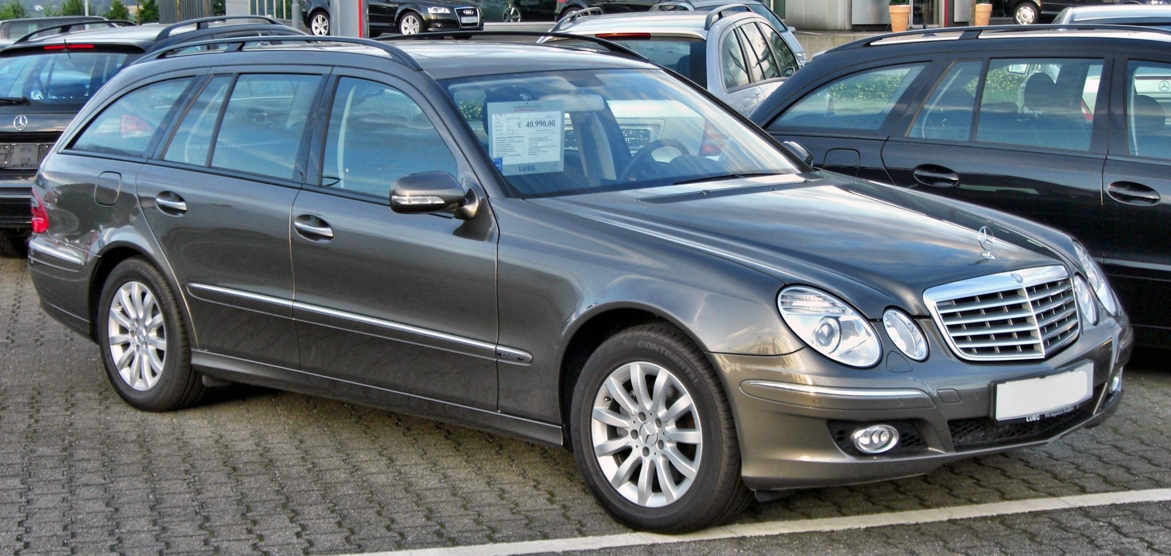 Mercedes E-Klasse T-Modell (S211)